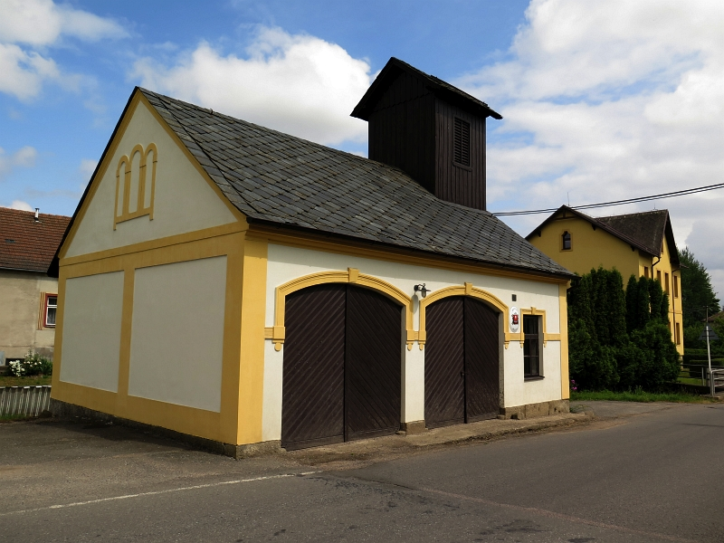 Hasičská zbrojnice, Horní Třešňovec 91, Horní Třešňovec.